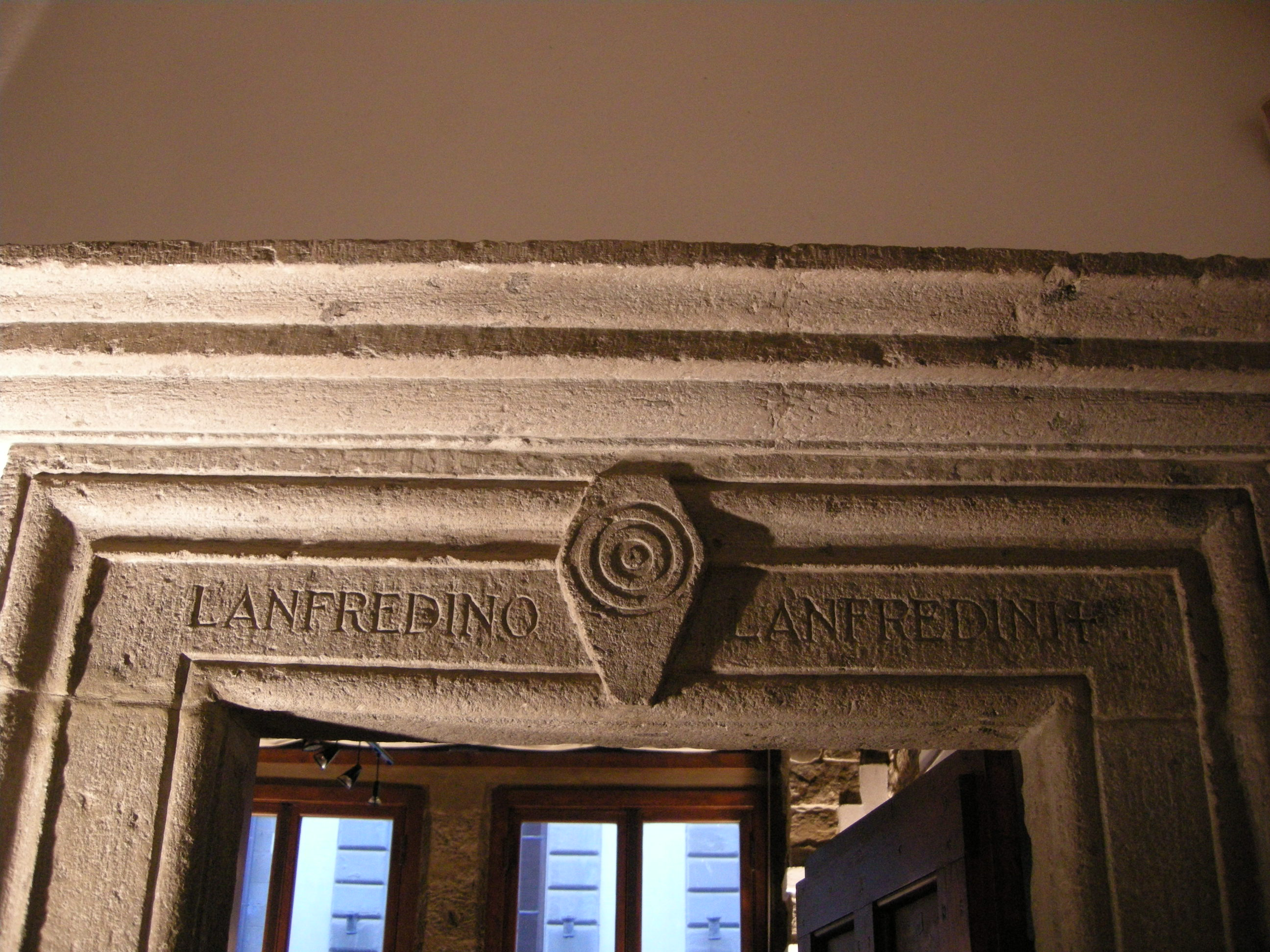 Torre dei lanfredini, portale